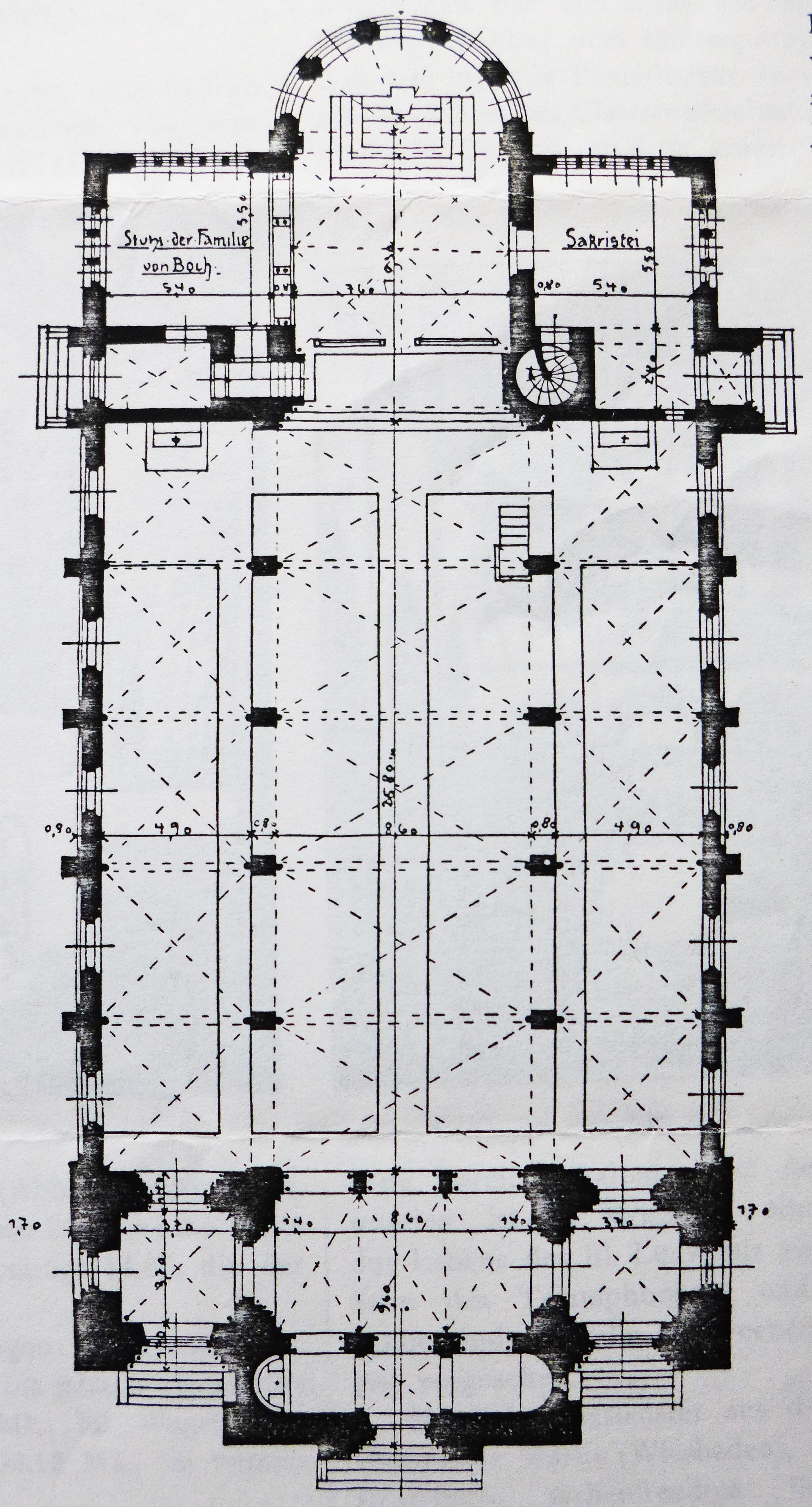 Grundriss der Mettlacher Lutwinuskirche, Ludwig Becker; aus: Ludwig Becker: Die neue Pfarrkirche zu Mettlach, in: Zeitschrift für christliche Kunst, 18. Jahrgang, Düsseldorf 1905, S. 199–204, hier S.200.